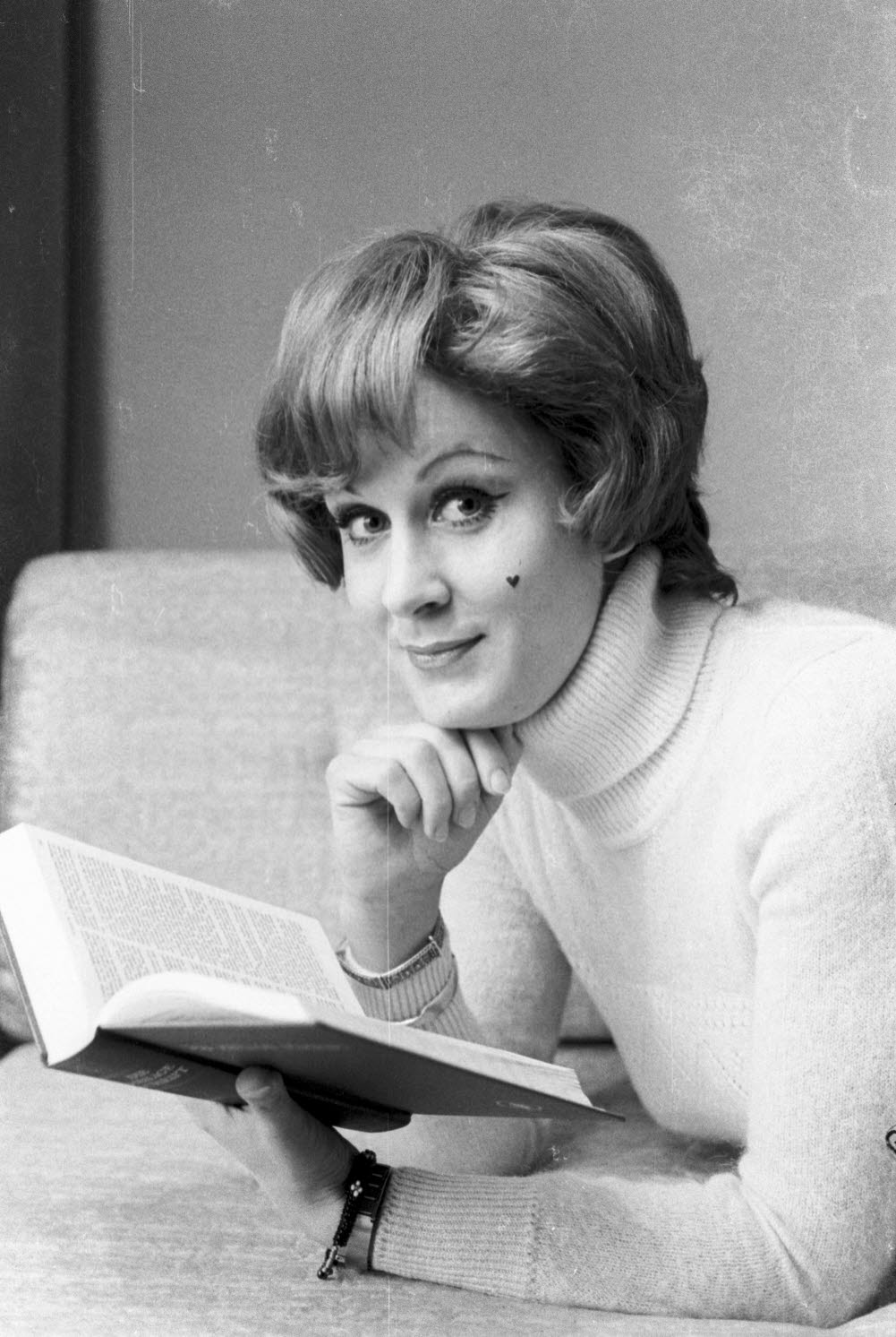 Hauptdarstellerin des Musicals "Fanny Hill".